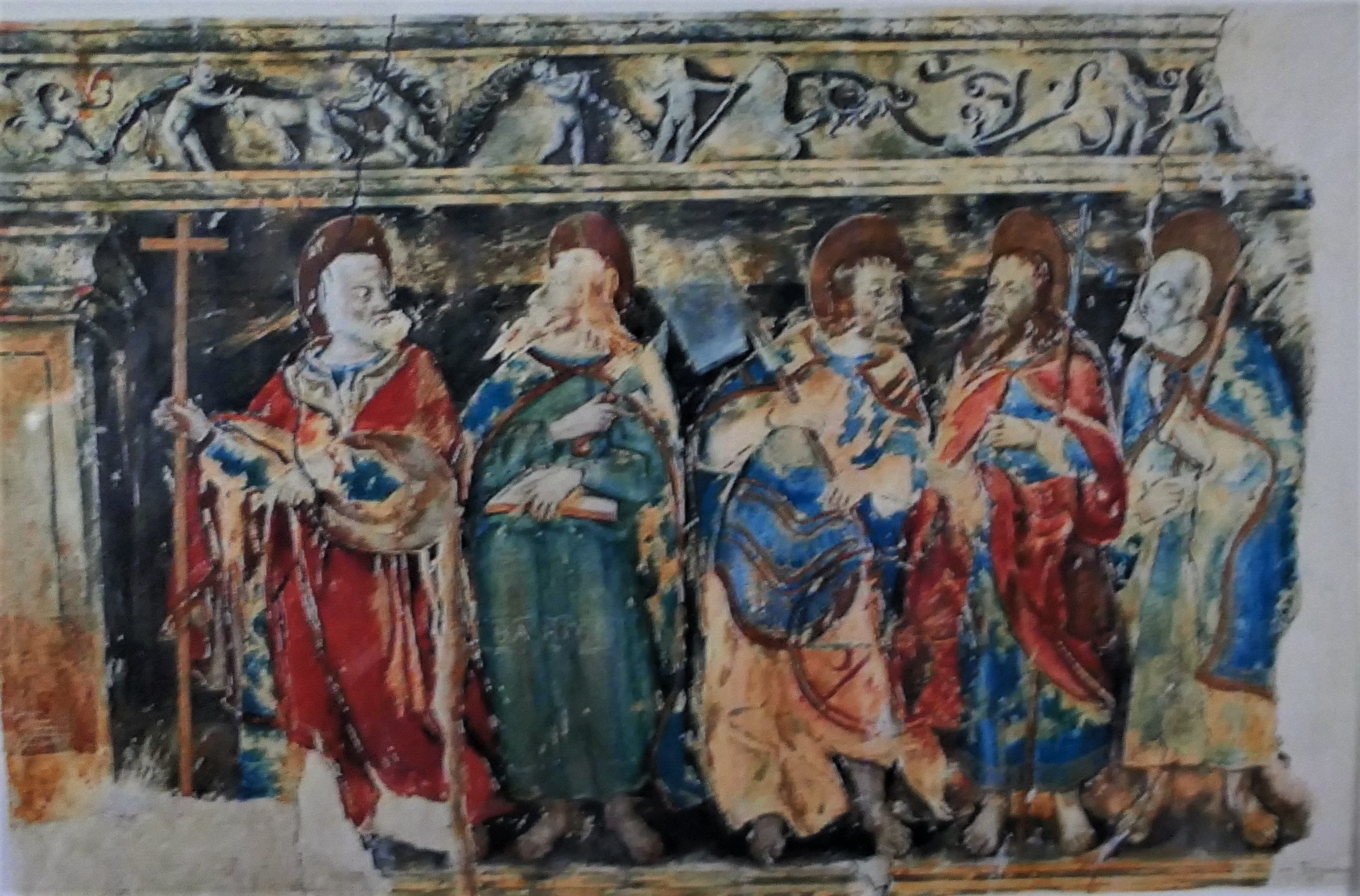 Molinet, fresque des apôtres, de l'ancienne église